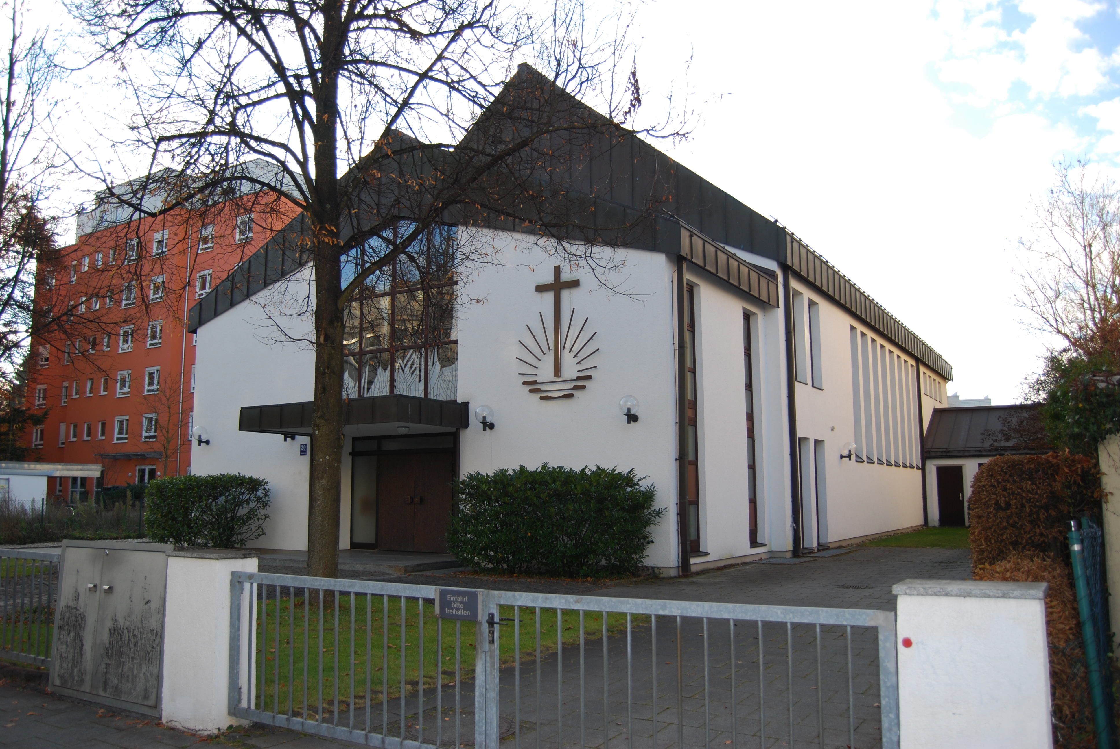 Neuapostolische Kirche in München-Thalkirchen; Waakirchner Straße 20; Blick von Nord-Osten